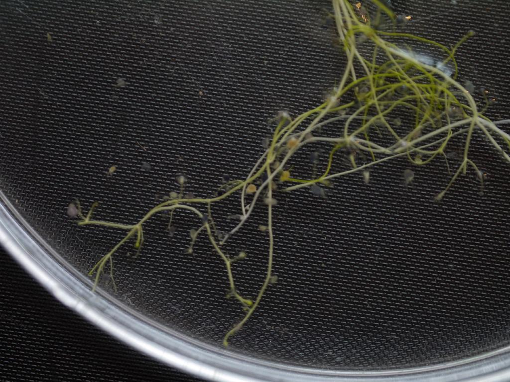 Utricularia exoleta：ミカワタヌキモ 2015/08/01 和歌山県田辺市：Tanabe City. Wakayama Pref. Japan ；栽培品